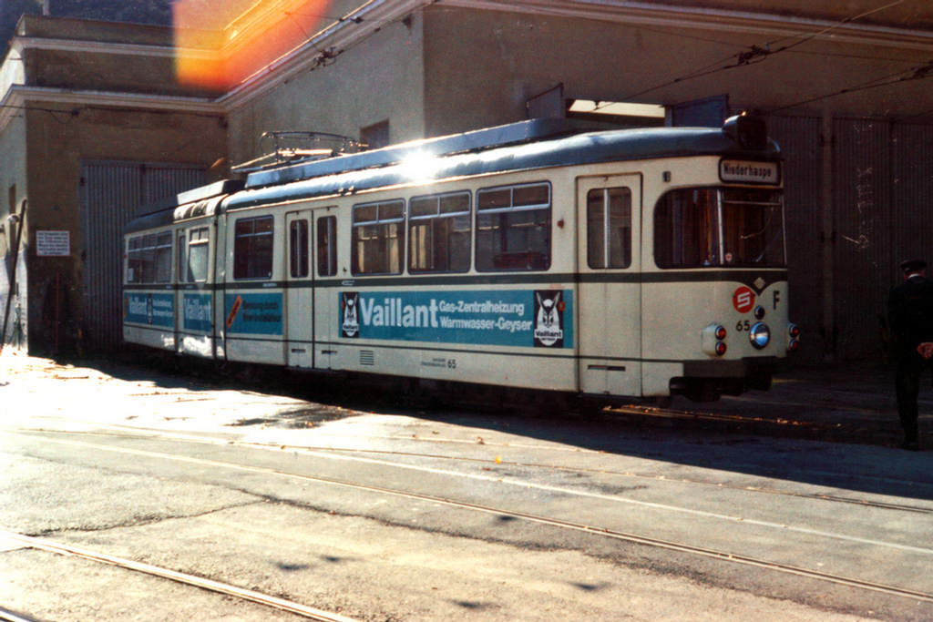 Fahrzeug kurz nach der Anlieferung 1976 im alten Bergiselbahnhof, noch im Hagener Farbschema und sechsachsig. Fahrzeug der Straßenbahn Hagen kurz nach seinem Verkauf an die IVB beim alten Bergiselbahnhof 1976.